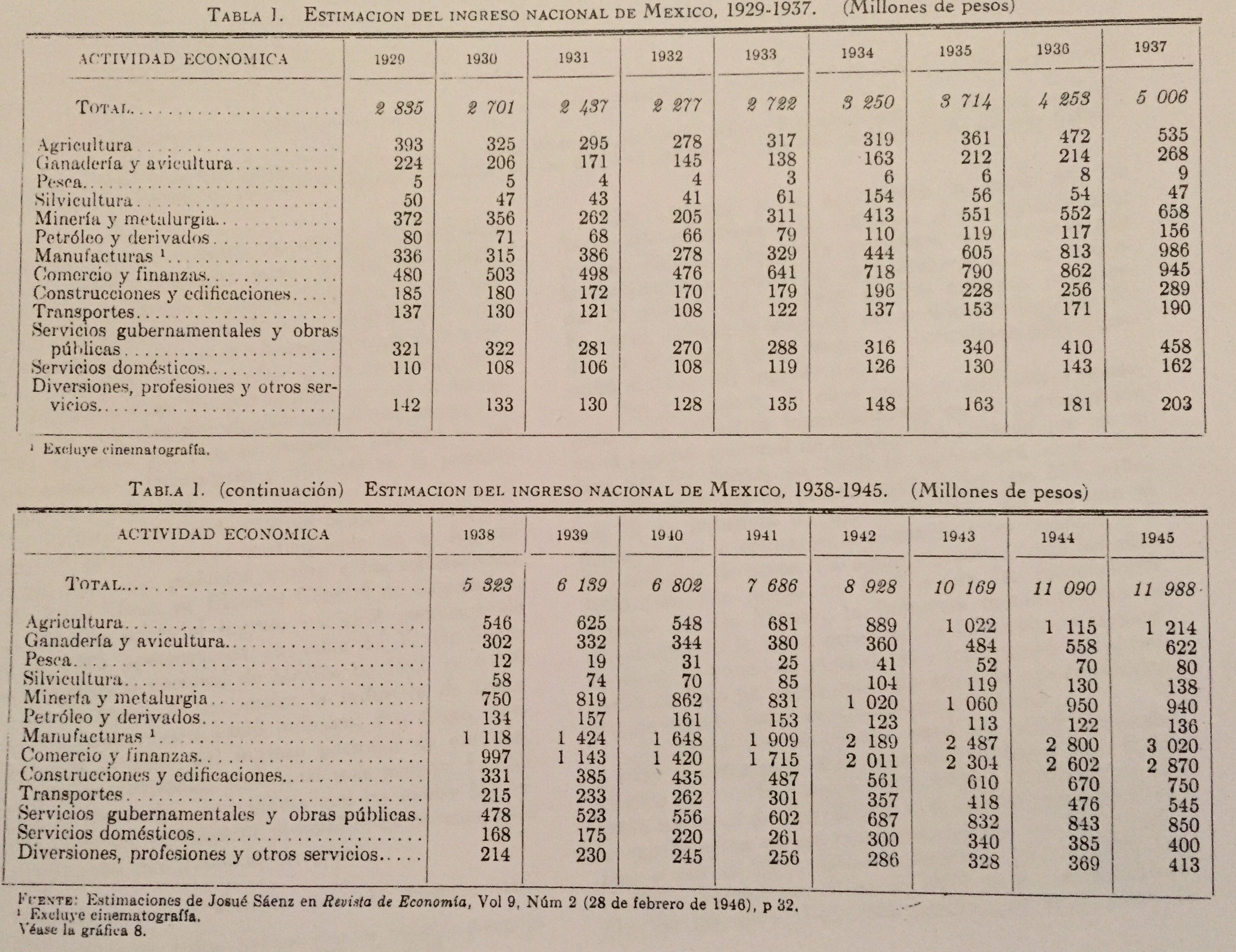 Ingreso Nacional de México 1929-1937